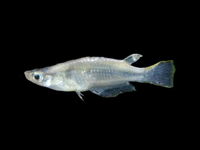 Medaka de Java (Oryzias javanicus)